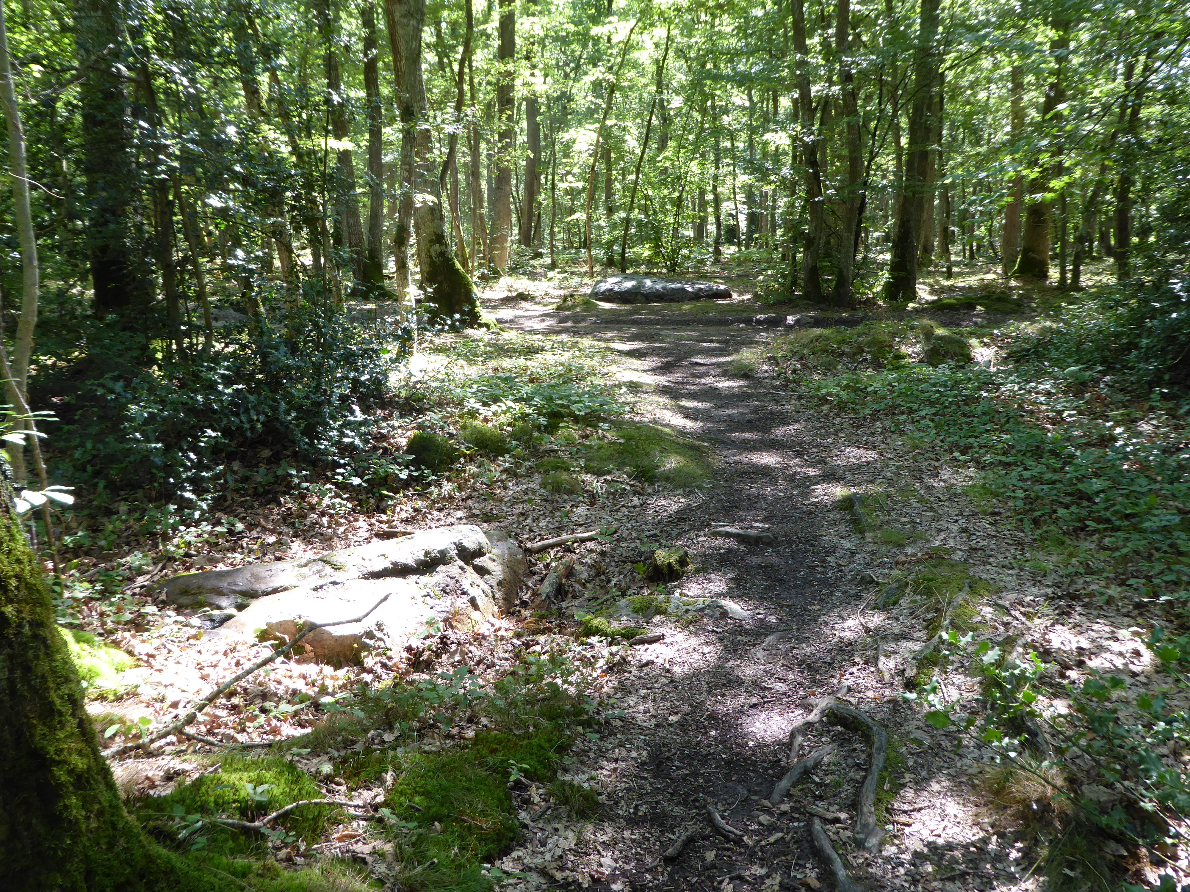 les deux polissoirs d'Abondant, Eure-et-Loir, France.